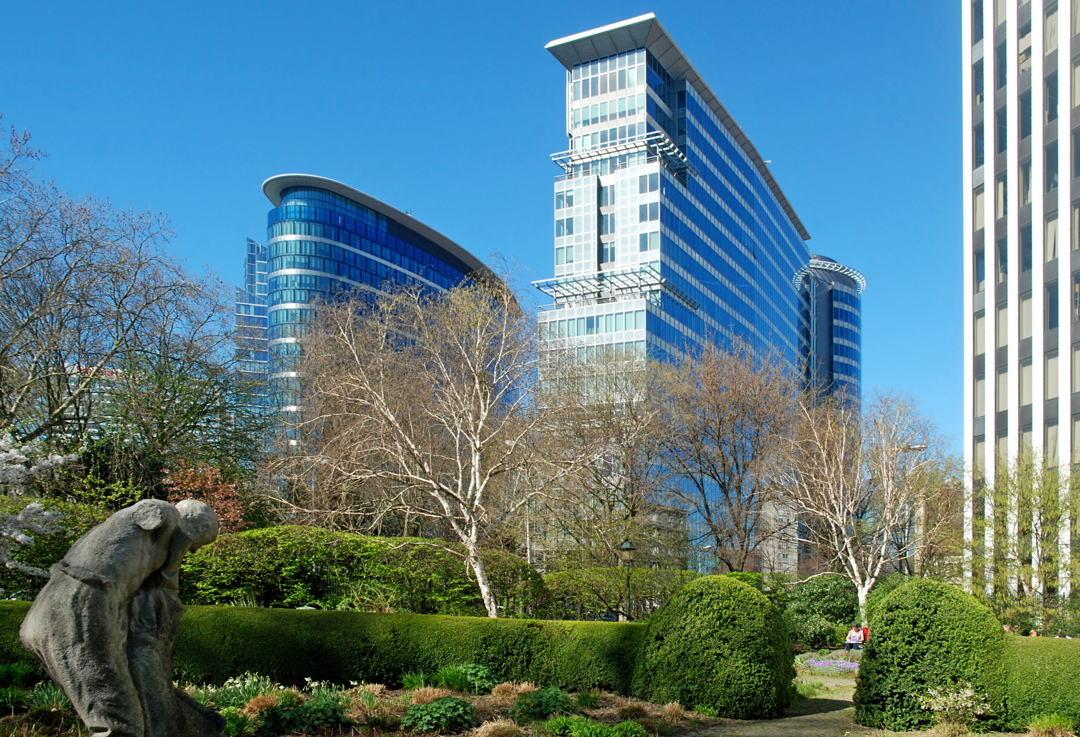 Belgique - Bruxelles - Immeubles Covent Garden et Boréal (Architecture postmoderne en Belgique)